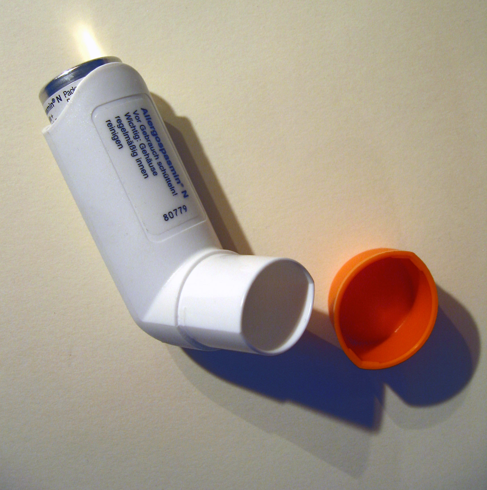 Inhaler